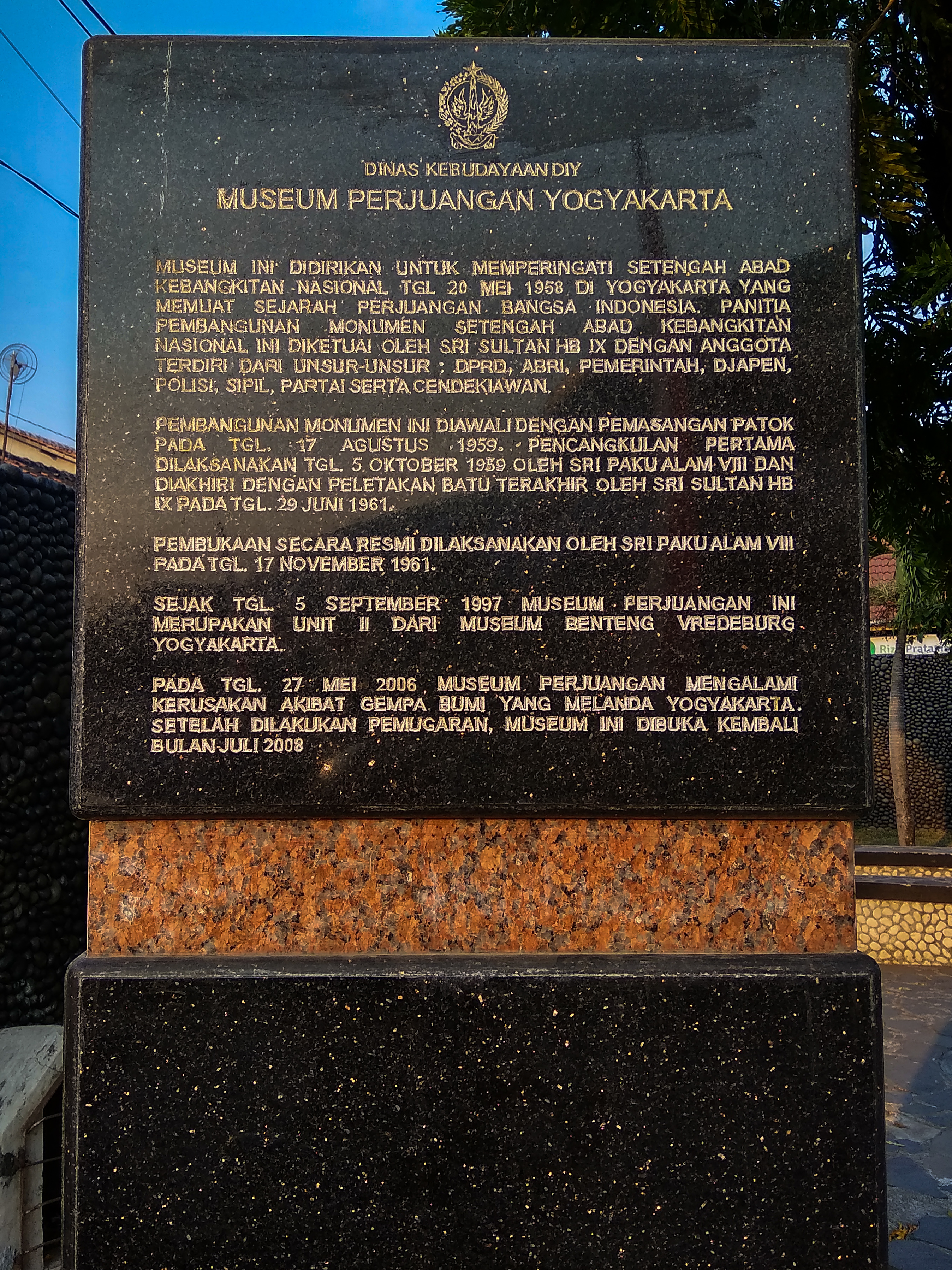 Museum Perjuangan Yogyakarta adalah museum yang berada di area Ndalem Brontokusuman.